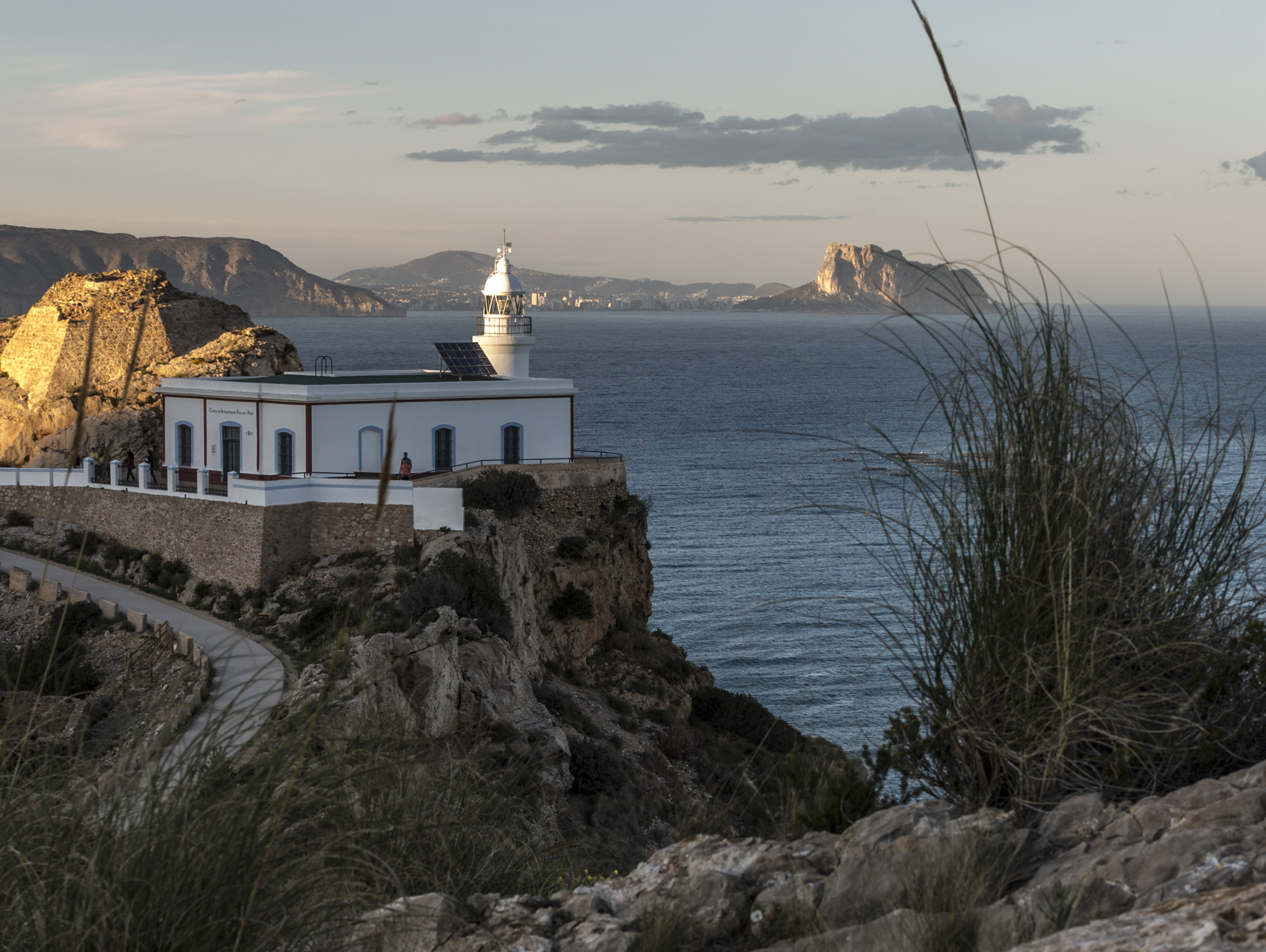 Faro de El Albir, en L'Alfàs del Pi (provincia de Alicante, España)